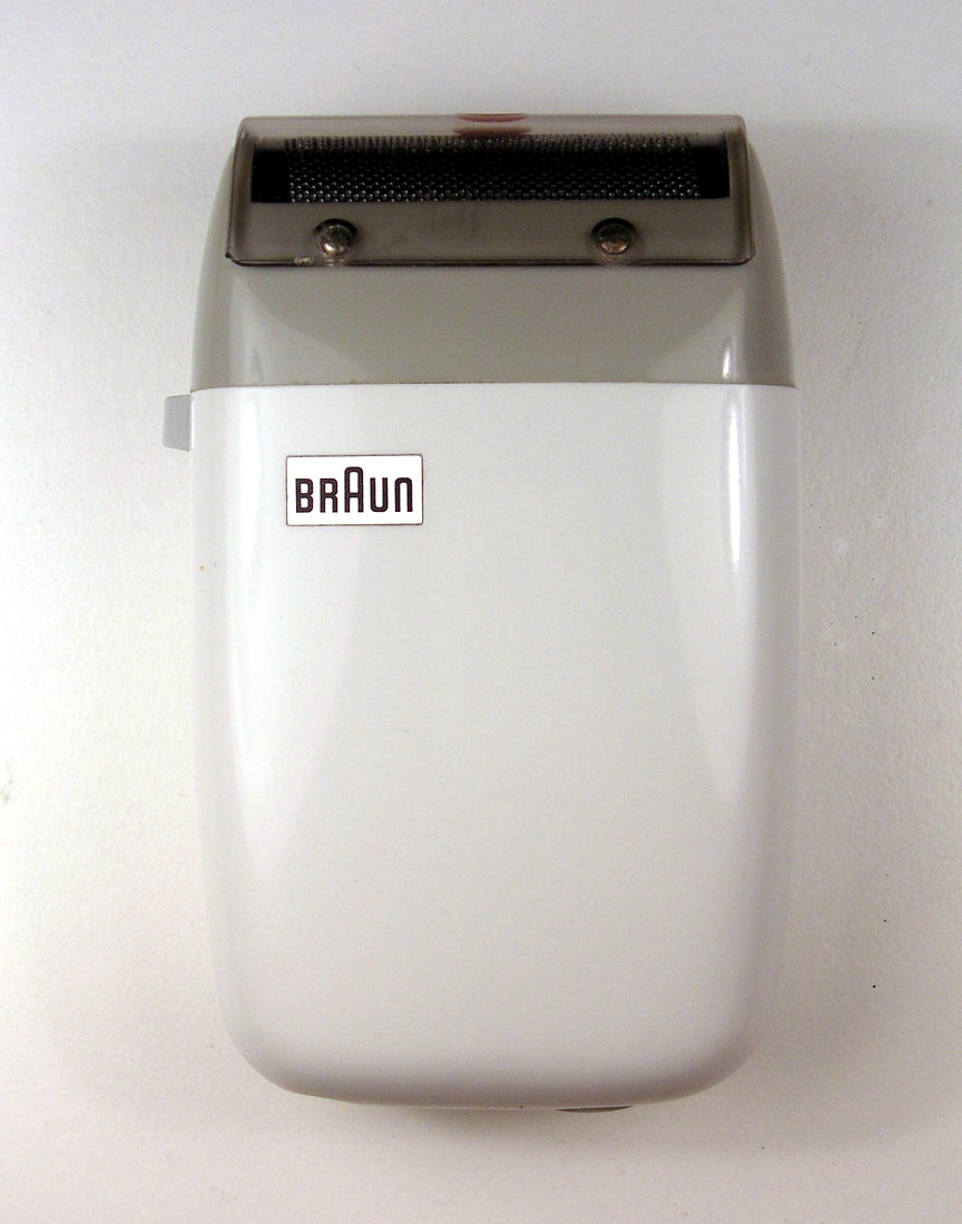 Braun Special SM 2, Design Richard Fischer